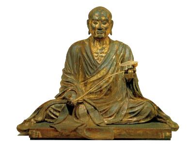 行基菩薩坐像(唐招提寺蔵・重要文化財)